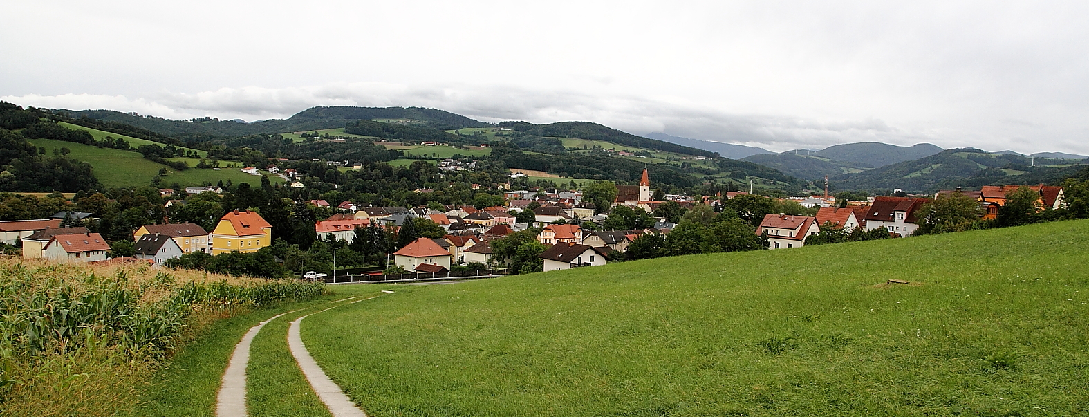 Nordansicht der niederösterreichischen Stadtgemeinde Wilhelmsburg.